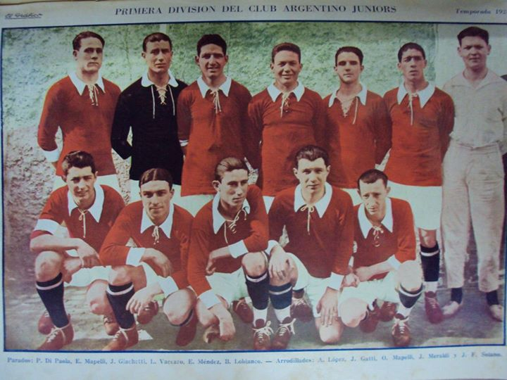 An Argentinos Juniors line-up of 1927.